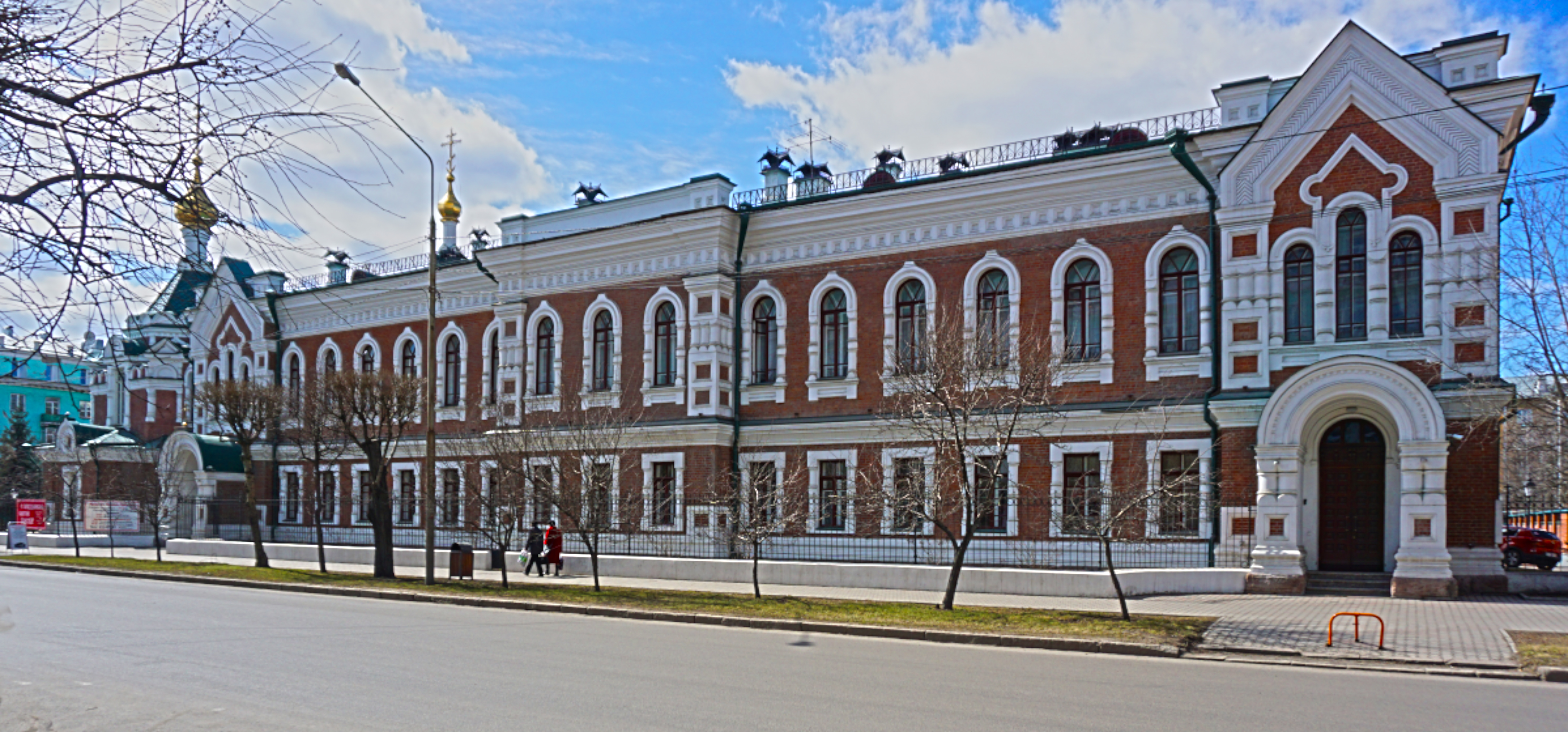 Архиерейский дом: улица Горького, 27, Красноярск, Красноярский край